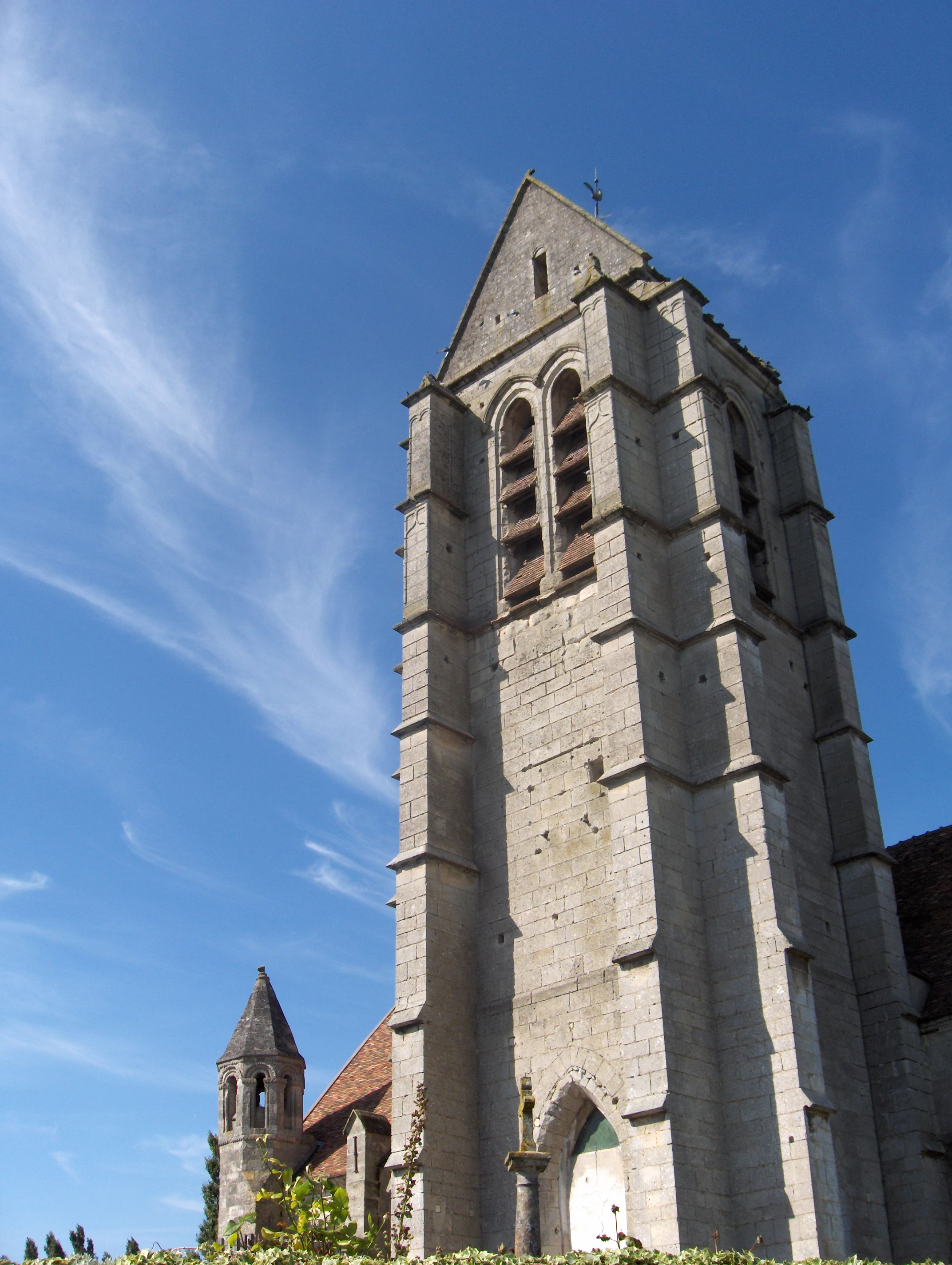 Clocher de l'Eglise de l'Assomption à Haravilliers (Val-d'Oise)